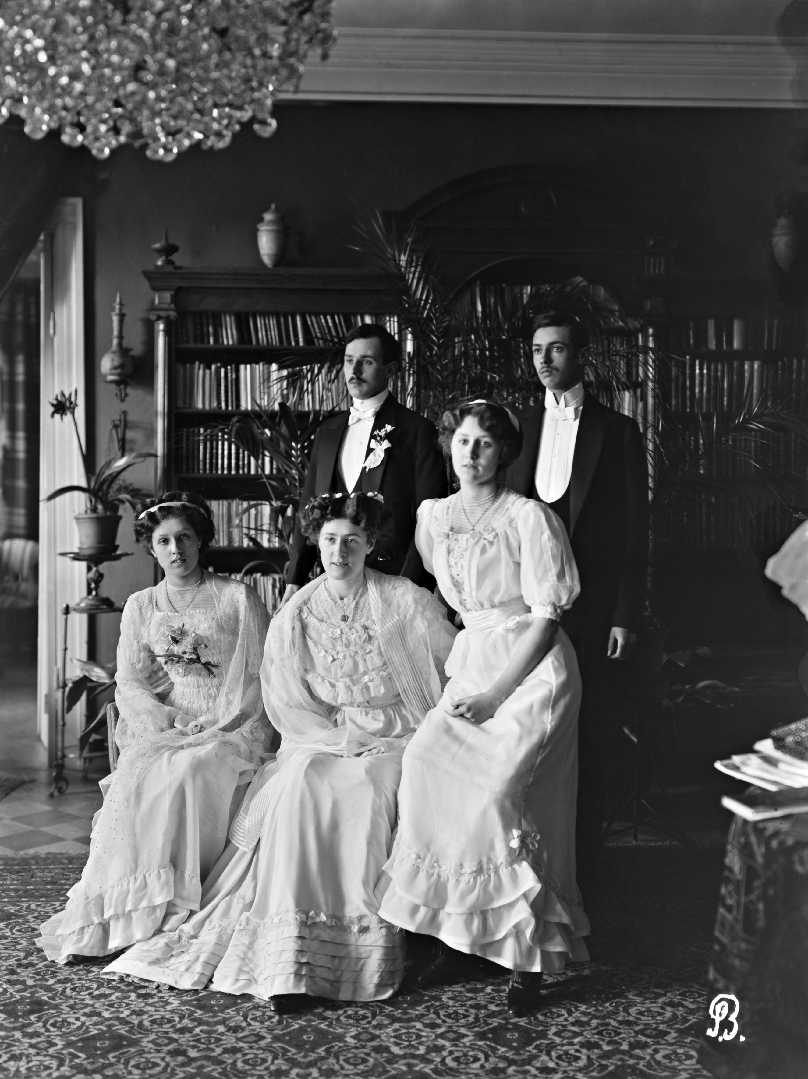 Vapaaherra, professori Maximus Widekind af Schülténin (21.9.1847 - 13.5.1899) ja Anna Lovisa Emilia af Schülténin lapset; Vapaaherra, professori Maximus Widekind af Schülténin (21.9.1847 - 13.5.1899) ja Anna Lovisa Emilia af Schülténin lapset. Mahdollisesti promootioon osallistumassa. Edessä tyttäret Olga Anita, Ingrid ja Ester Mary; takana pojat Kurt Otto ja Marius Max. -- vedos negatiivi repronegatiivi, paperi lasi filmi, mv